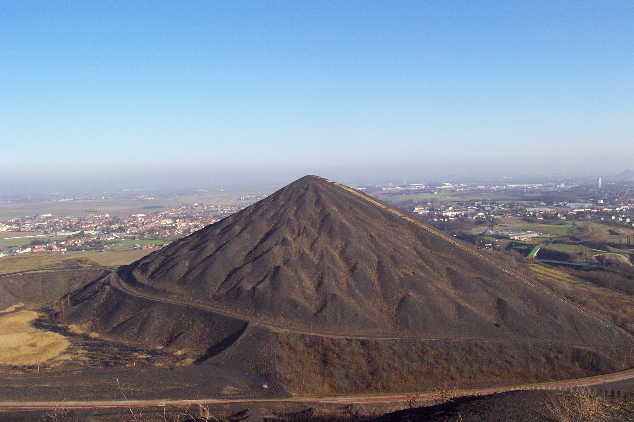 Terrils n° 74, 74A et 74B respectivement dénommés 11 - 19 de Lens Est, 11 - 19 de Lens Ouest et 11 - 19 de Lens Nouveau, fosse n° 11 - 19 de la Compagnie des mines de Lens, Loos-en-Gohelle, Pas-de-Calais, Nord-Pas-de-Calais, France.